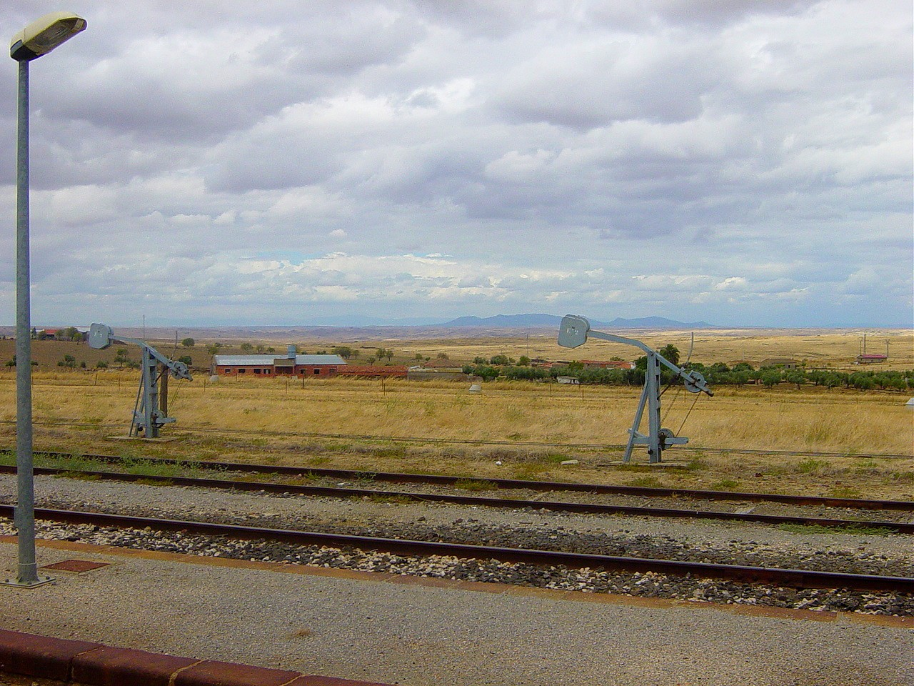 Gare de Castuera Province de Badajoz Espagne